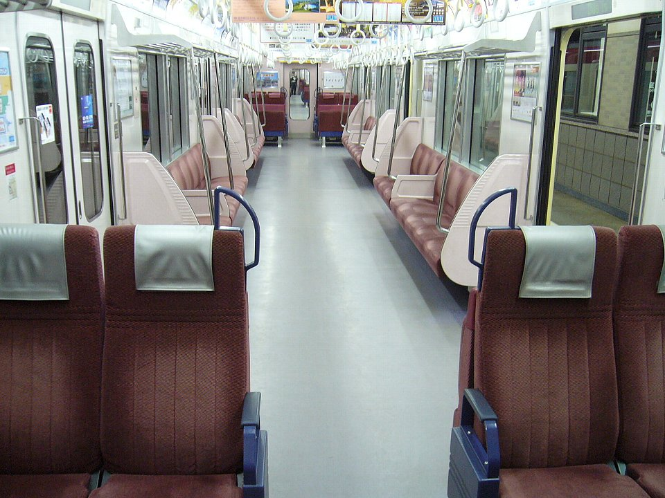 京急新1000形（1023号）車内 2006年12月 Bakkai撮影